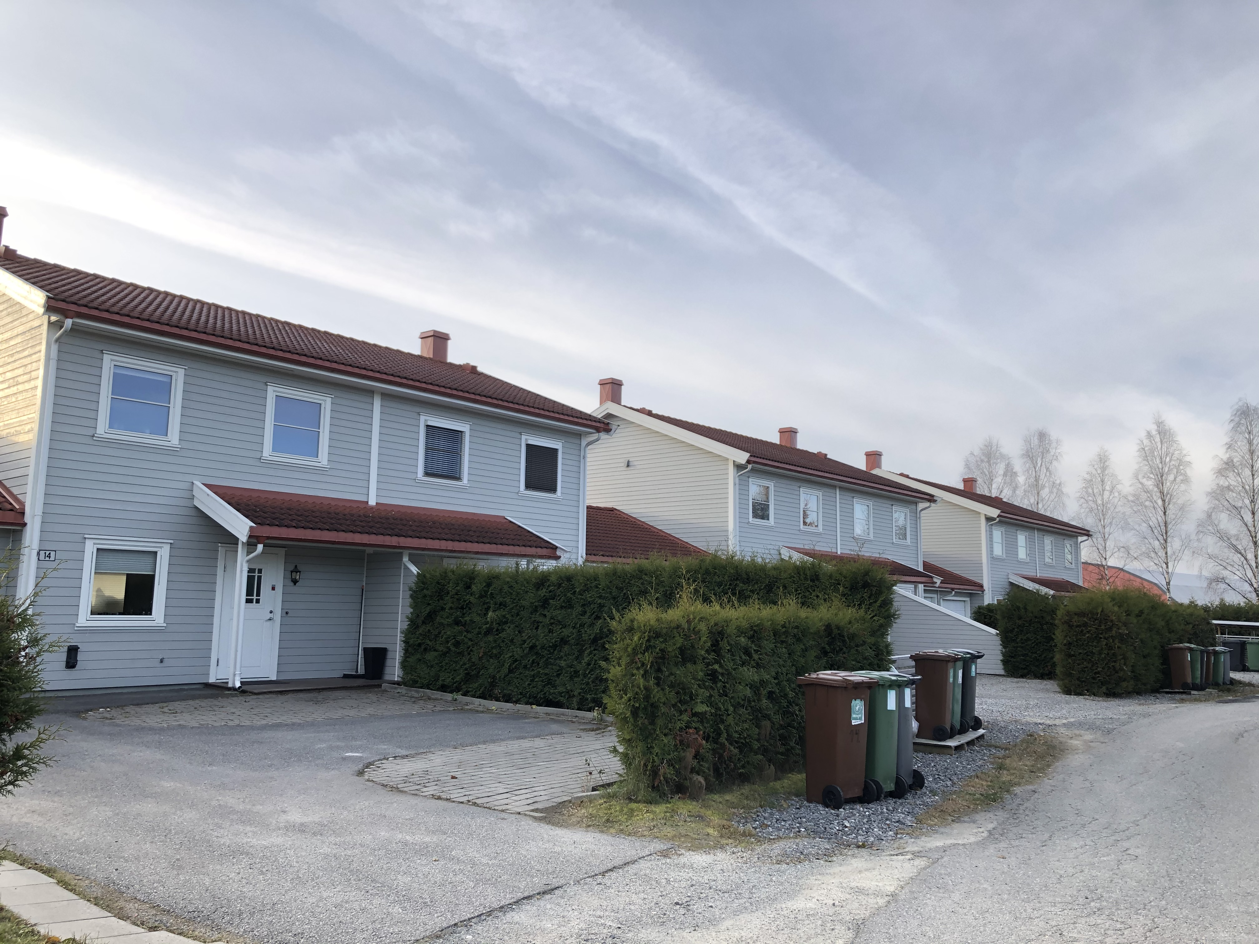 Moholtveien 14-24, Hønefoss